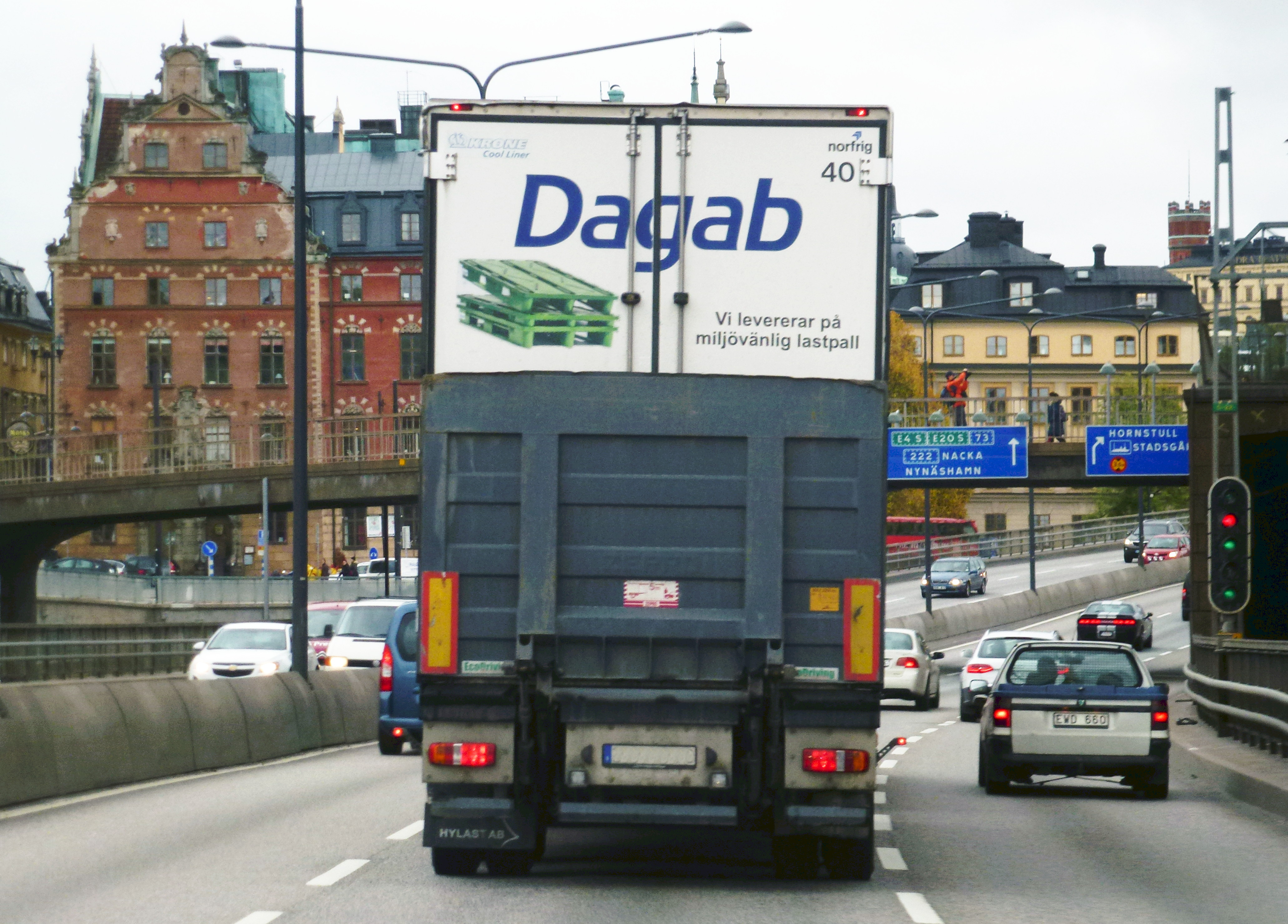 En Dagab distributionsbil på Centralbron i Stockholm